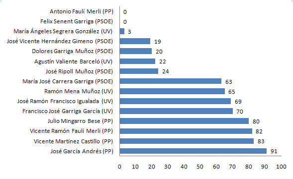 Númerode votos por candidato en las elecciones locales de 1999